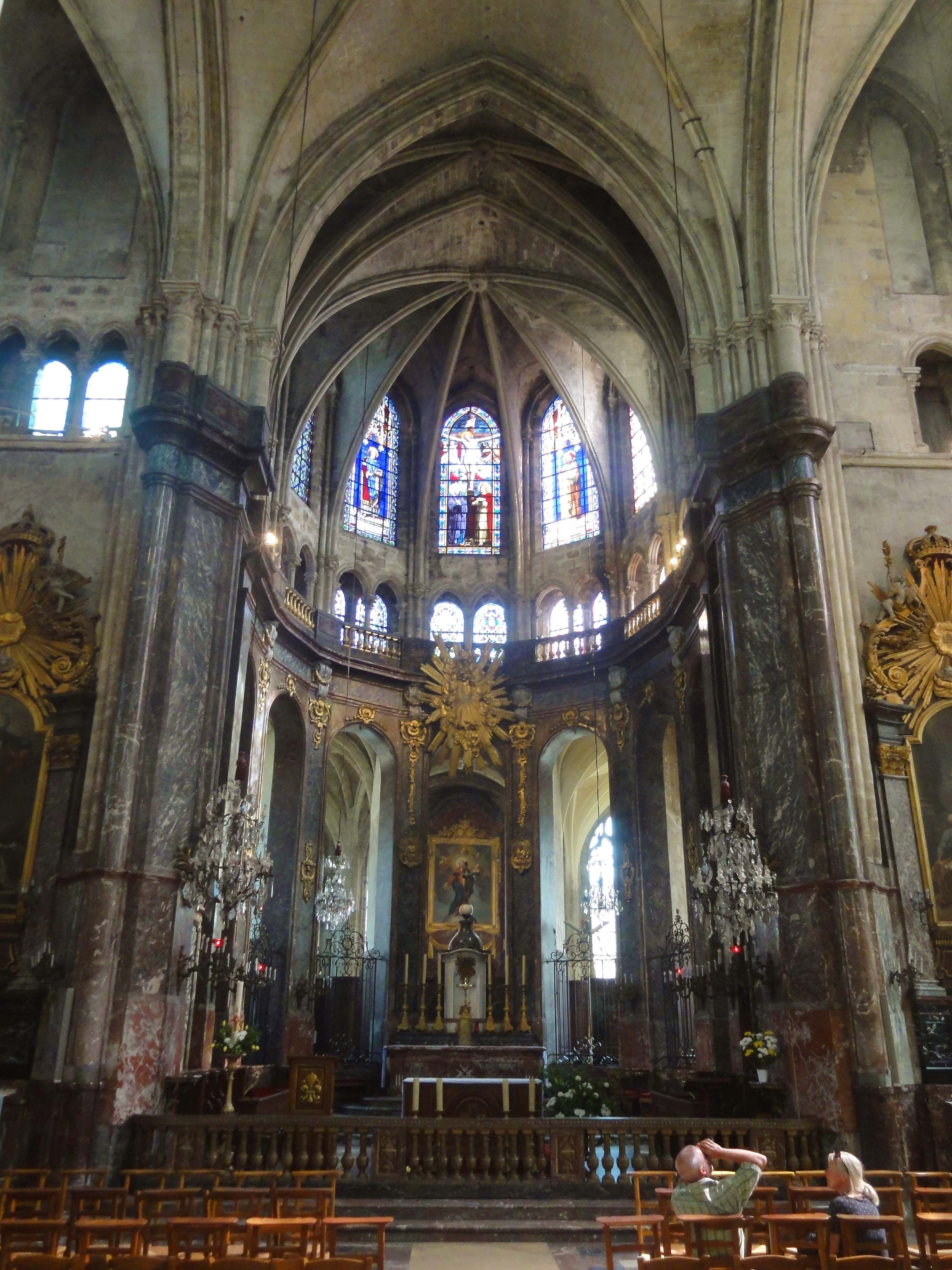 Transept - voir le titre du fichier.